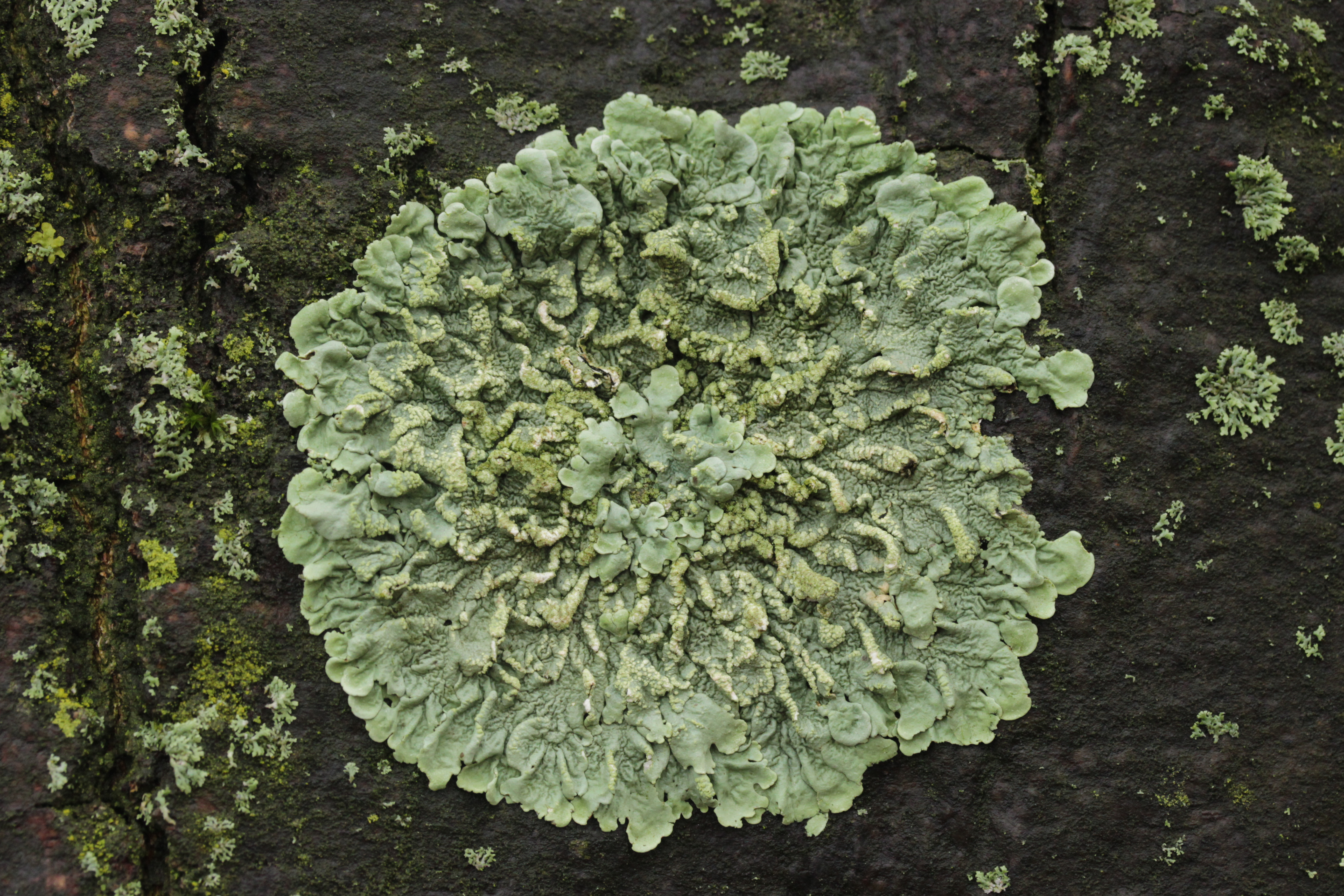 Flavoparmelia soredians